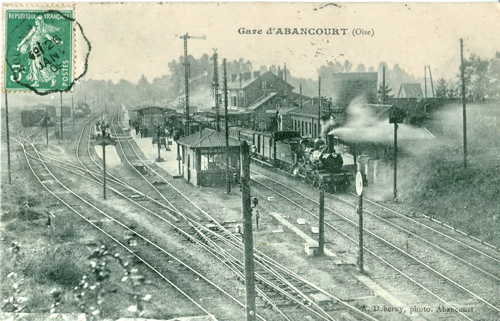 Carte postale ancienne éditée par Deberny La gare d'Abancourt. Les deux voies de droite sont celles de la ligne Amiens Rouen. Les deux du centre de la ligne Paris - Le Tréport